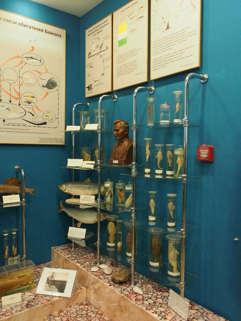 Baikal Limnology Museum